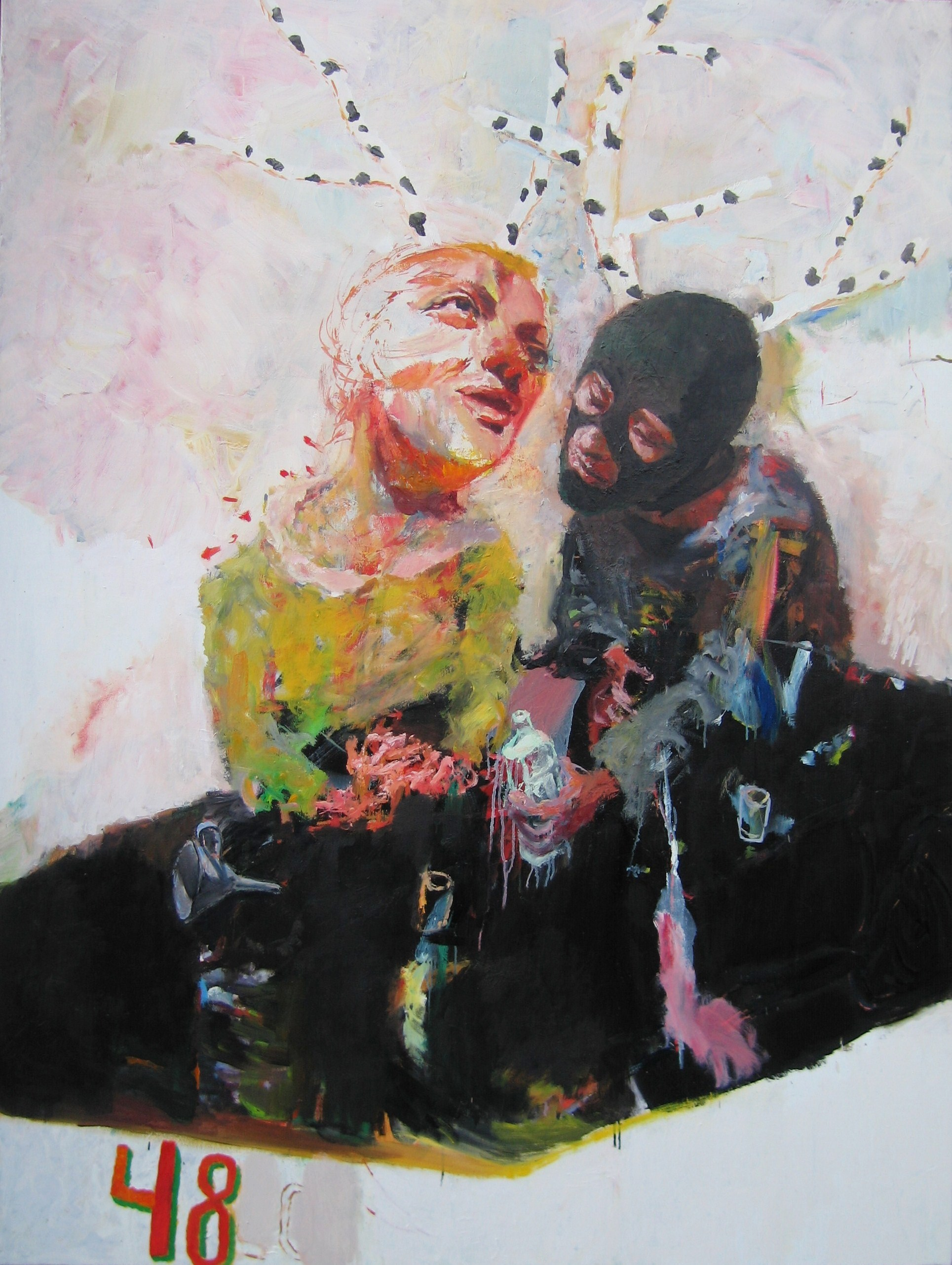 Художник Игорь Тишин. "Спиритический сеанс". Холст, масло, 200 х 150 см.